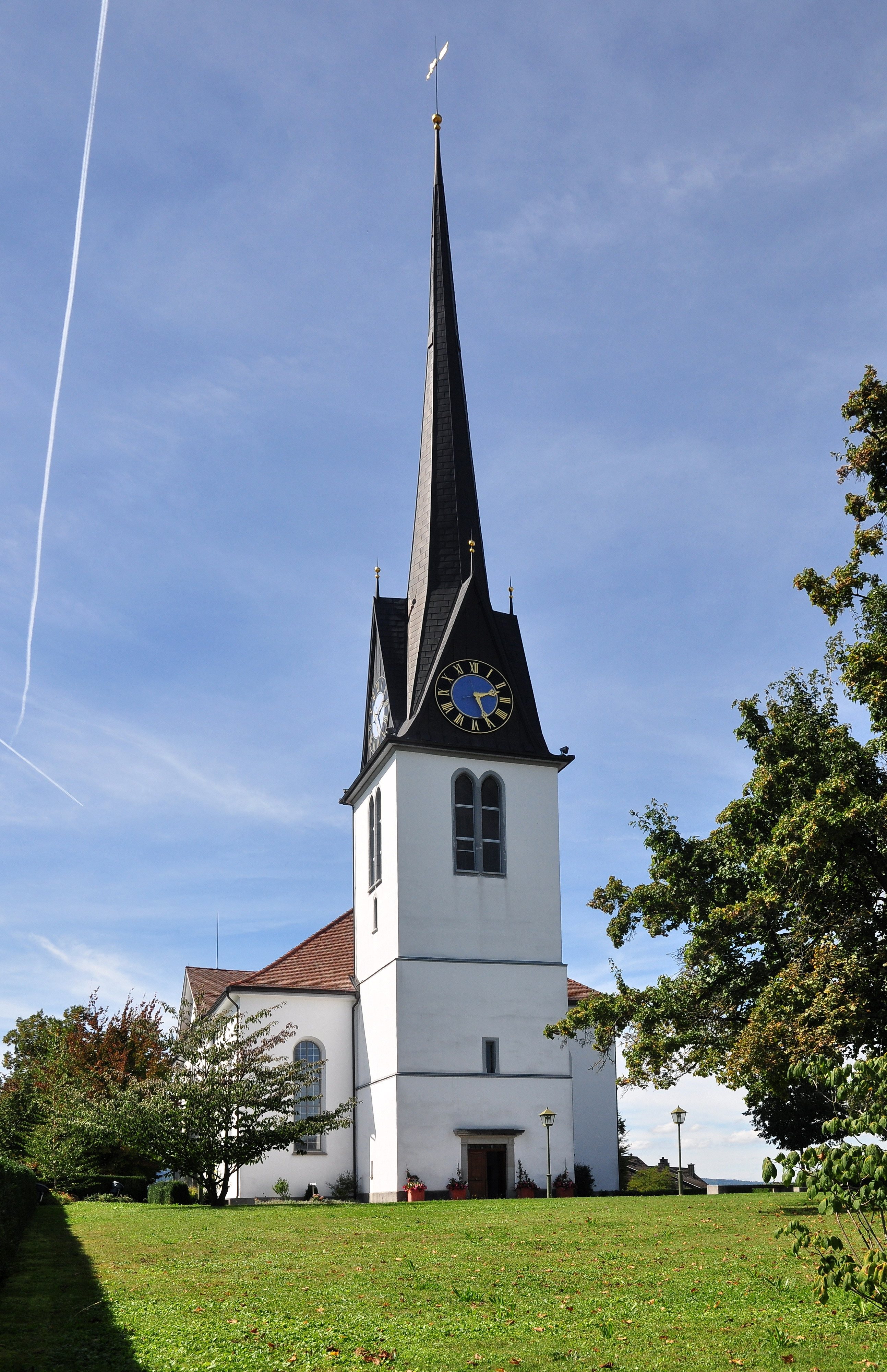 Reformierte Kirche, Bergstrasse in Gossau (Switzerland)